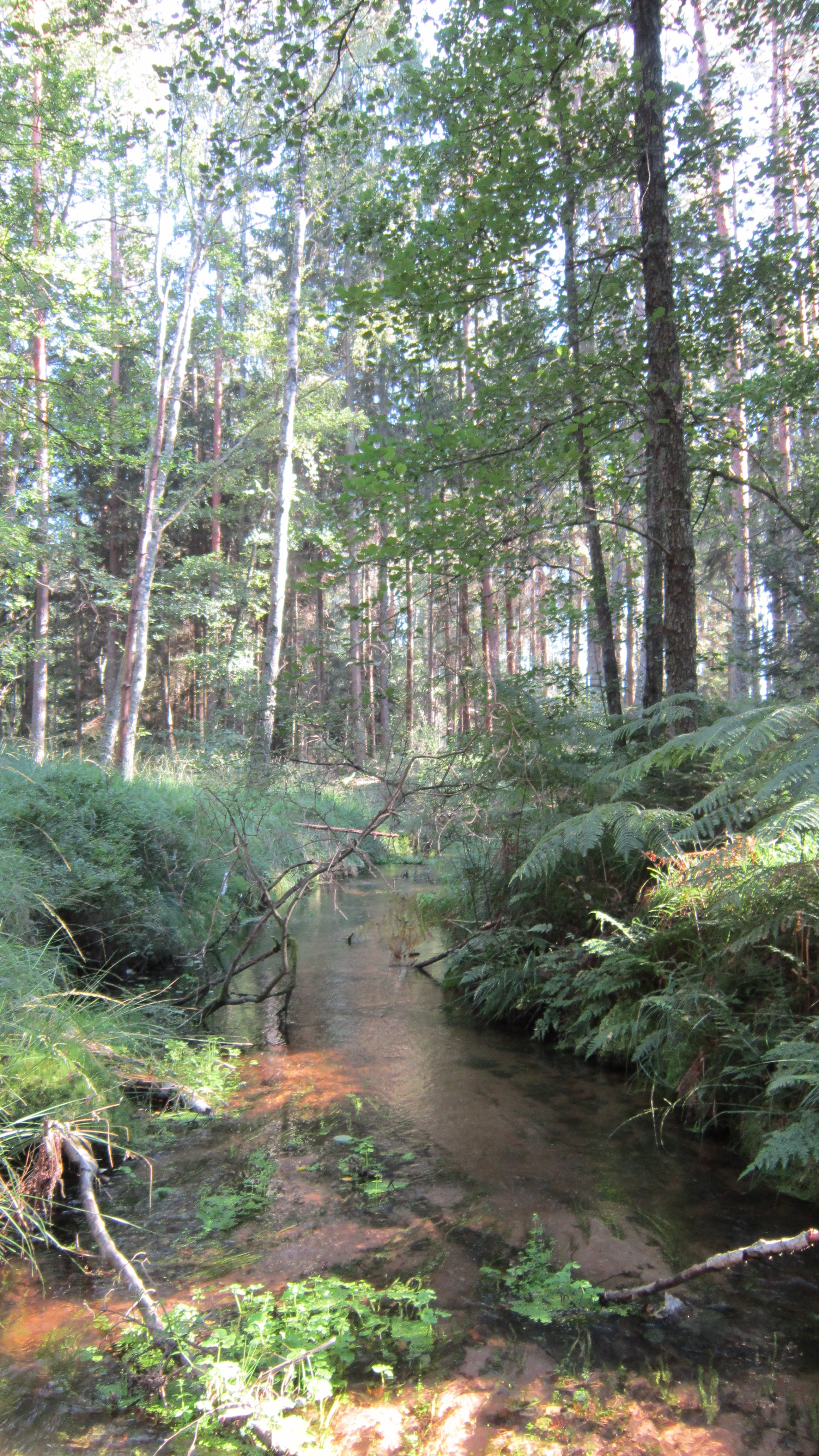 Le Scwharzbach dans la Réserve naturelle nationale des rochers et tourbières du Pays de Bitche, à la limite des communes de Sturzelbronn et de Philippsbourg en septembre 2012.